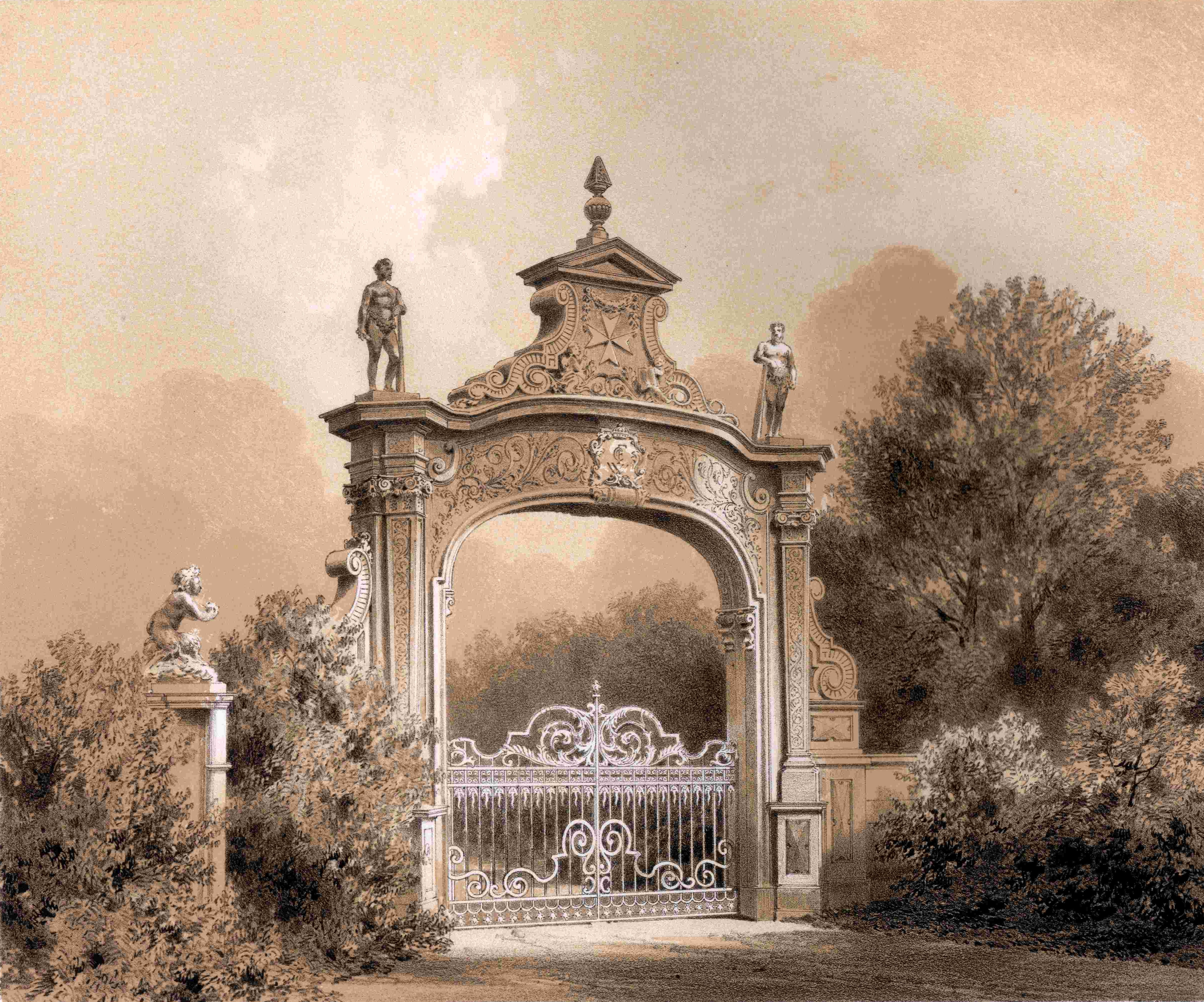 Berlin, Jagdschloss Glienicke, Eingang Transkription: Architekton.Skizzenbuch. Jahrg. 1872 Heft VI. Blatt 3. Petzholtz.Arch. Lith.Anst.v.W.Loeillot. Eingang zum Jagdschloss Kl. Glienecke bei Potsdam.